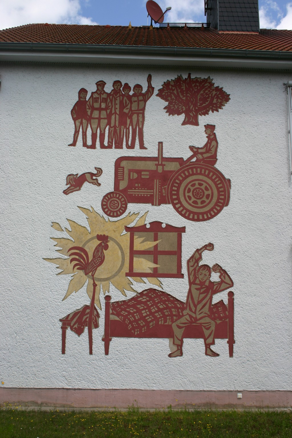 Wandbild "Polytechnischer Unterricht" Künstler: Werner Schinko Ort: Sietow, Müritz-Schule